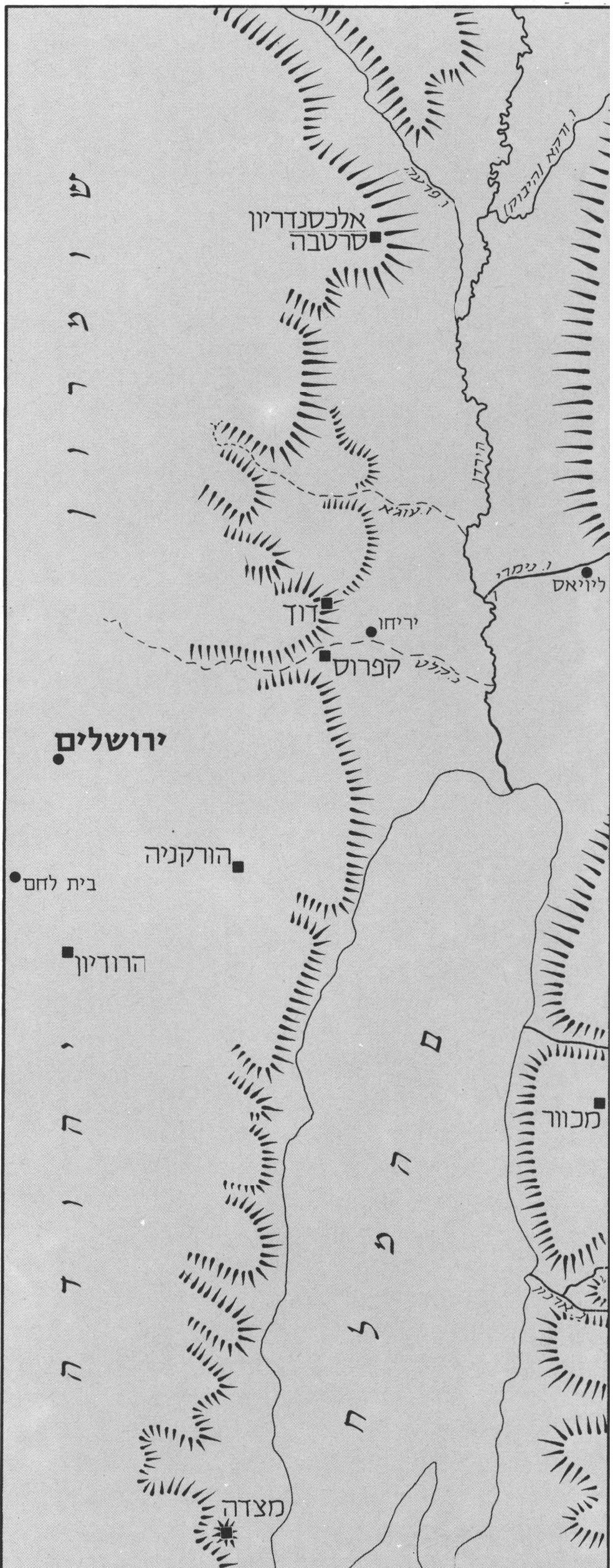 מפת מבצרי מדבר יהודה